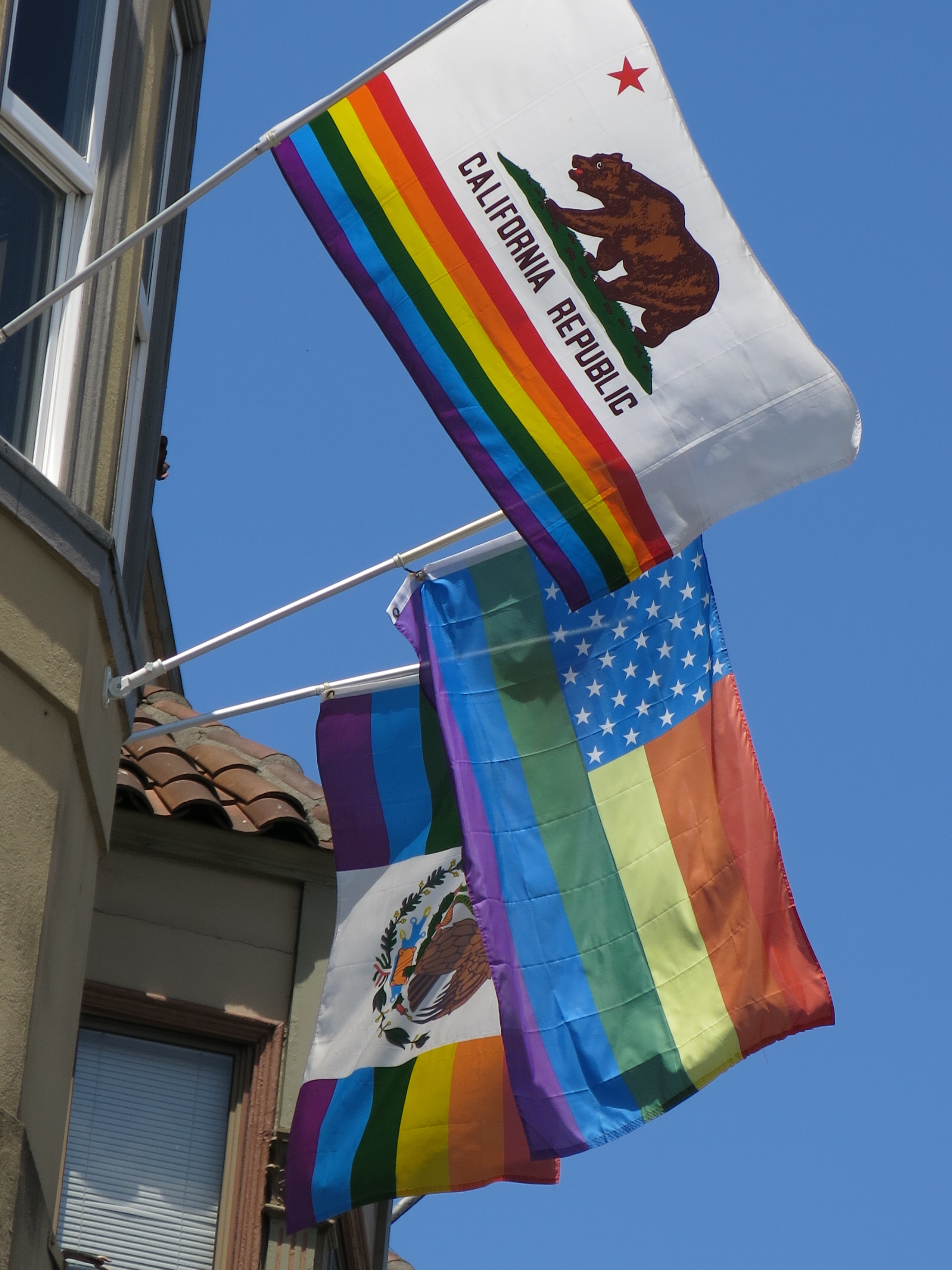 Fahnen von Californien und Amerika mit Regenbogenstreifen